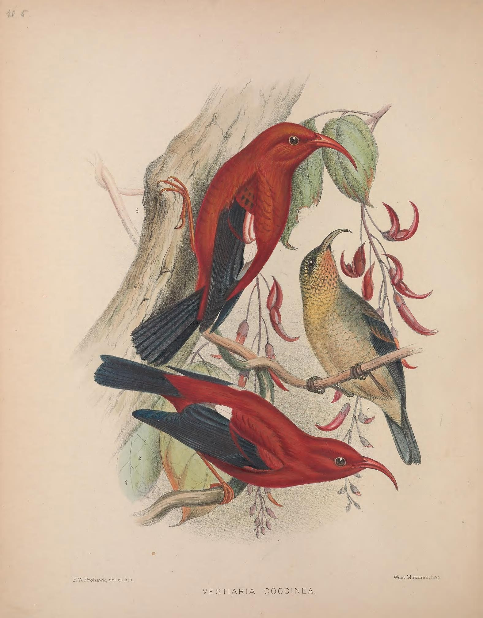 FW.Frohawk, del. et.li.tK VESTIARIA COCCINEA.